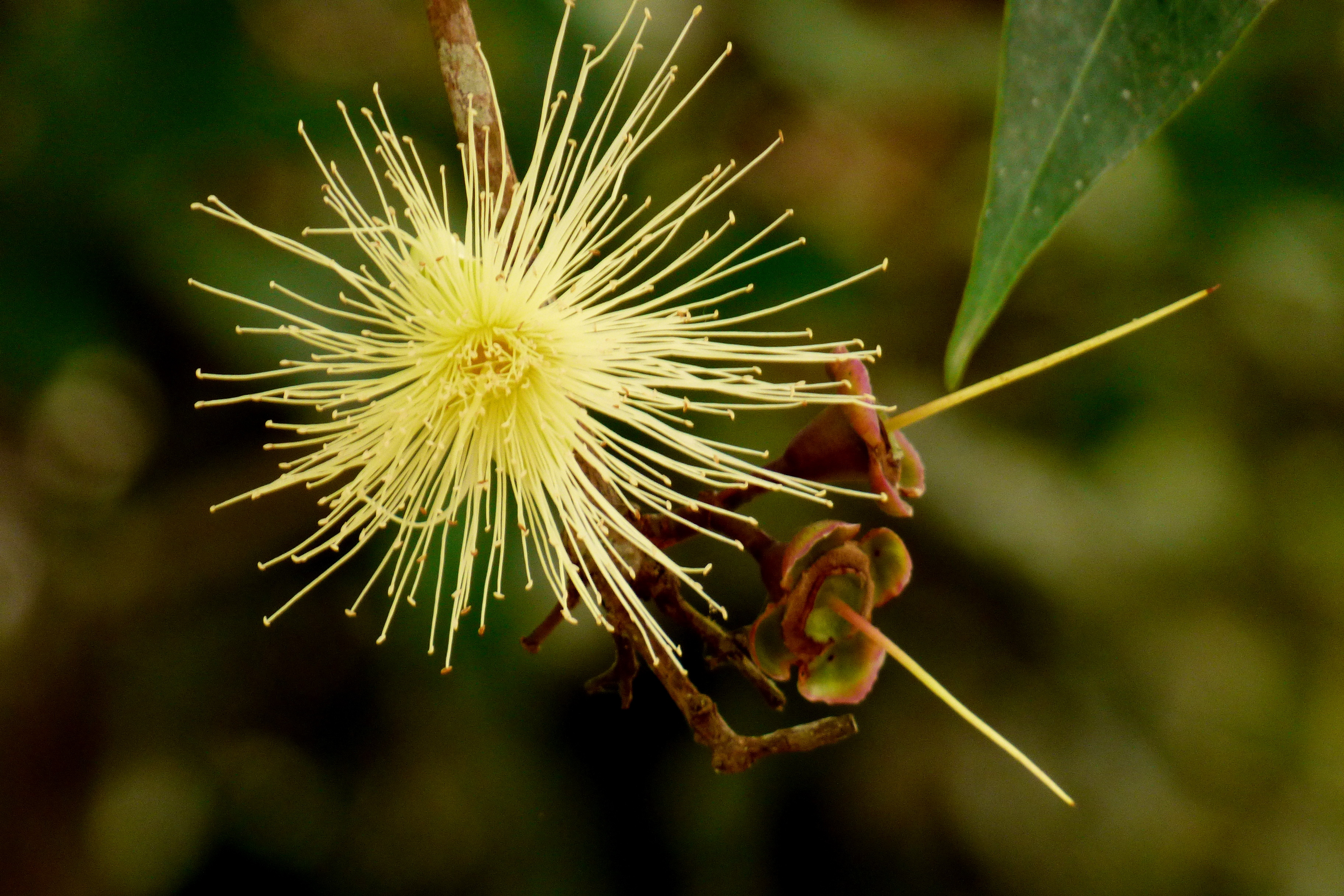 Pomo - Pomarrosa (Syzygium jambos)